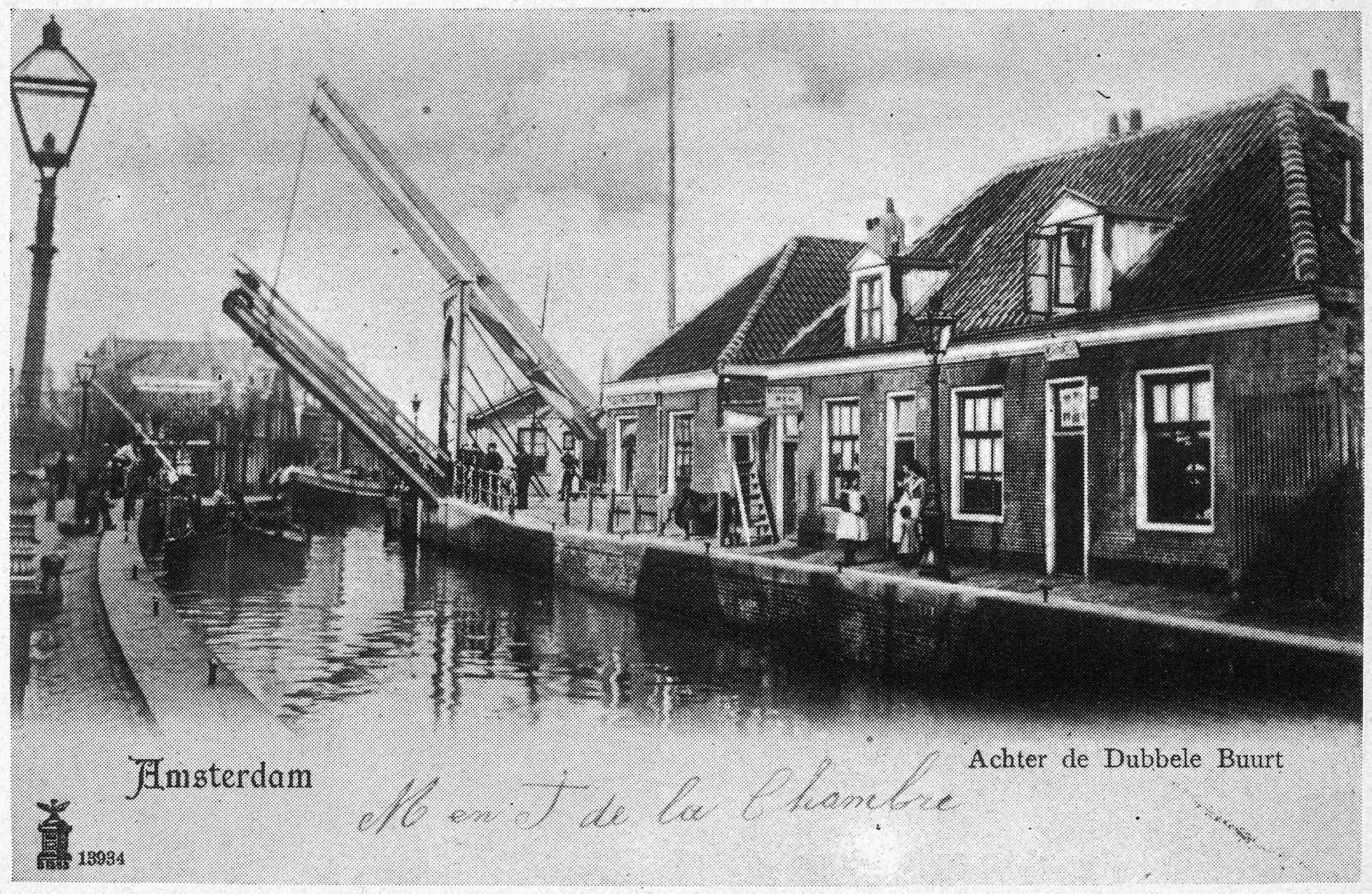 Photographed in Amsterdam between 1900 and 1914.